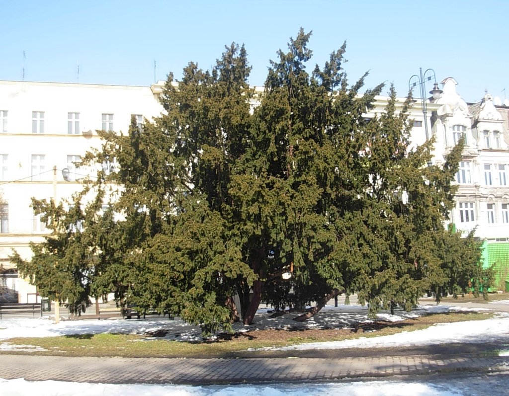 Cis – pomnik przyrody na placu Teatralnym w Bydgoszczy